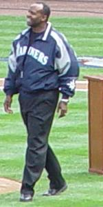 Alvin Davis